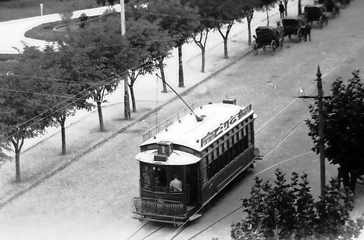 Tranvía Eléctrico por Chiclana y Pza Rivadavia, Bahía Blanca, Provincia de Buenos Aires, Argentina.